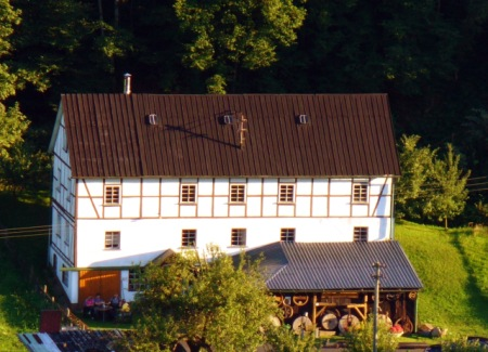 Nenkersdorfer Wassermühle